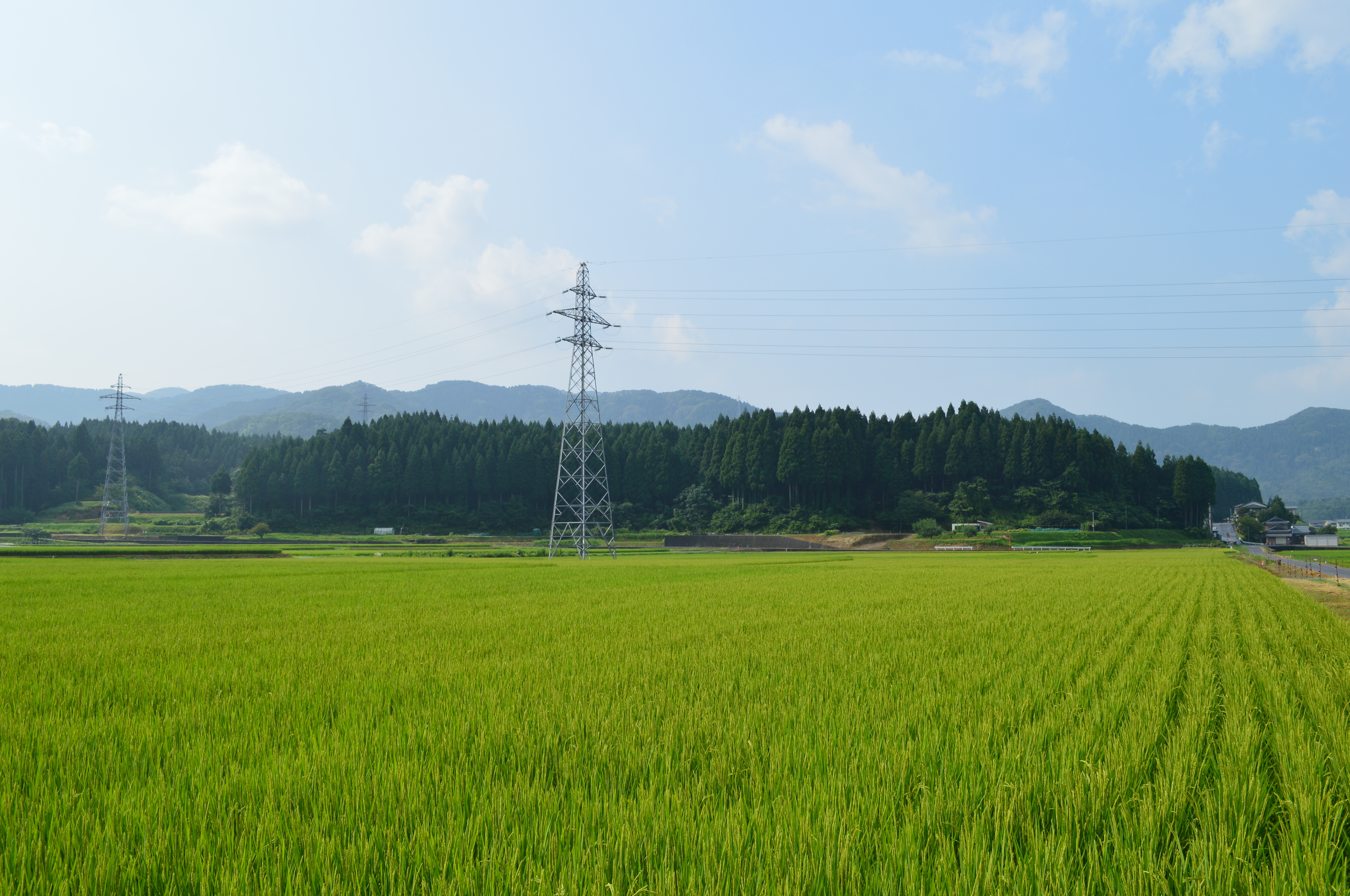 中古墳群 (越前町) 遠景